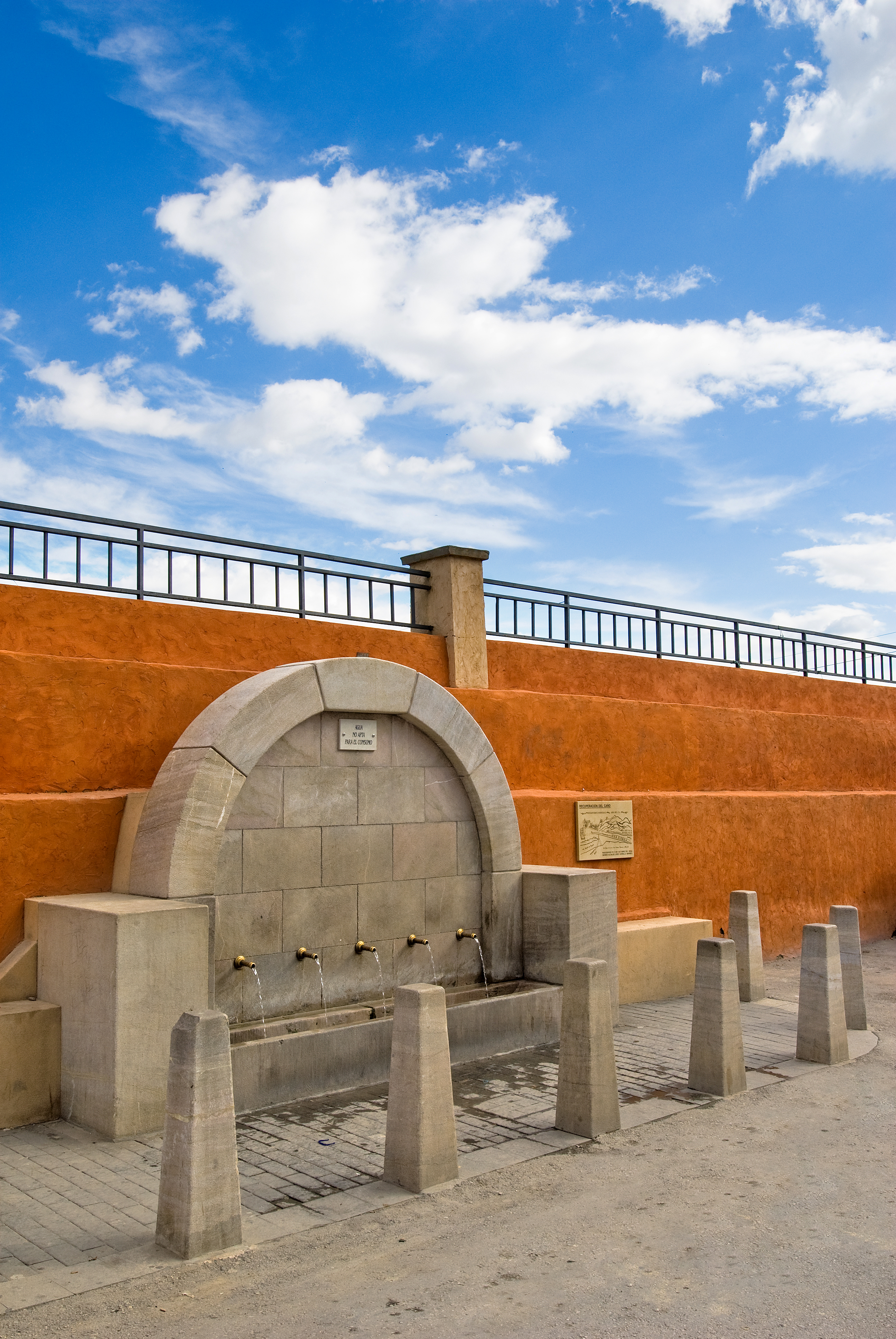 Fuente del Caño de Puerto Lumbreras situada junto a la Rambla de Nogalte